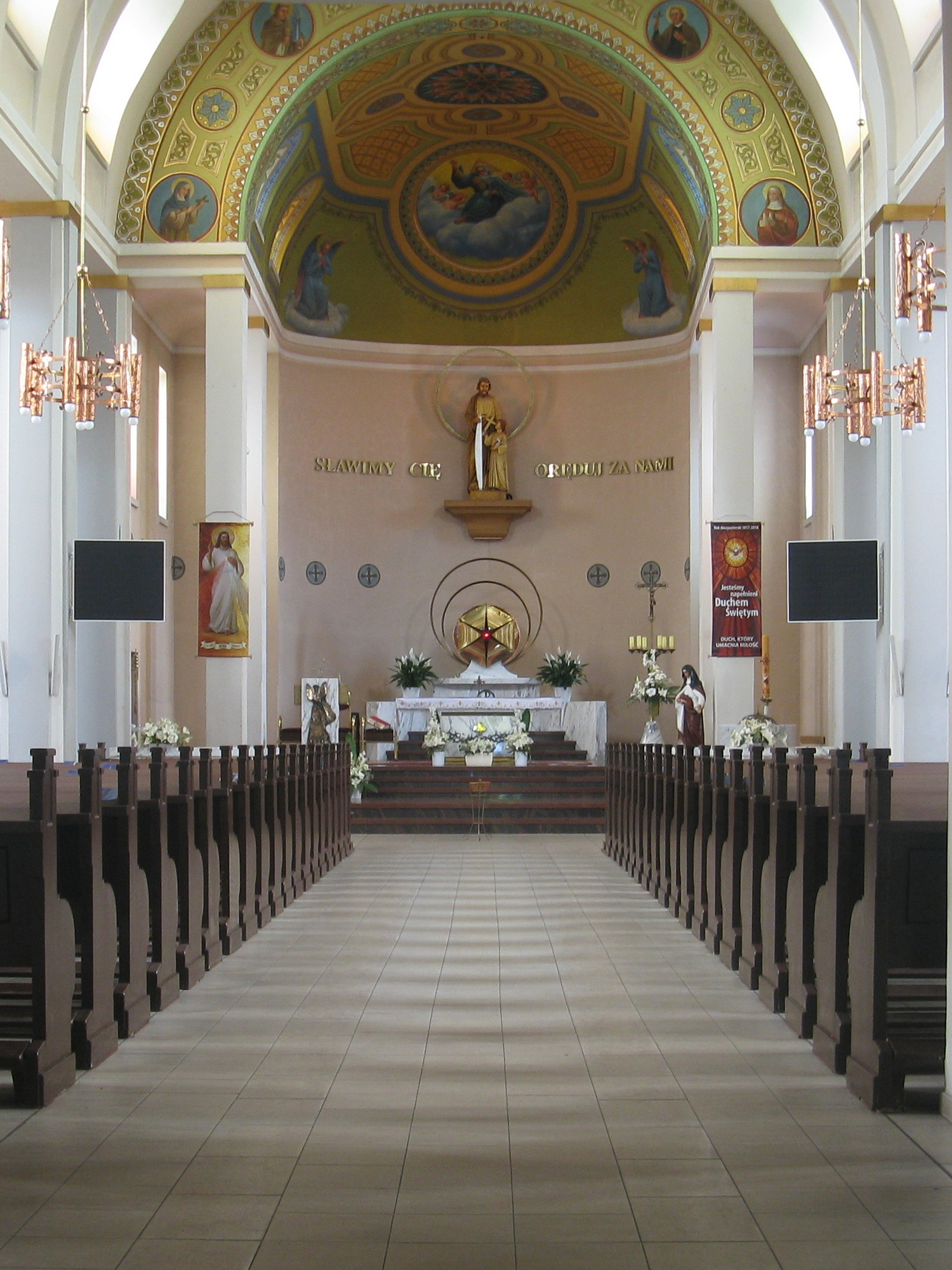 Wnętrze kościoła pw. św. Józefa w Świętochłowiach-Zgodzie.